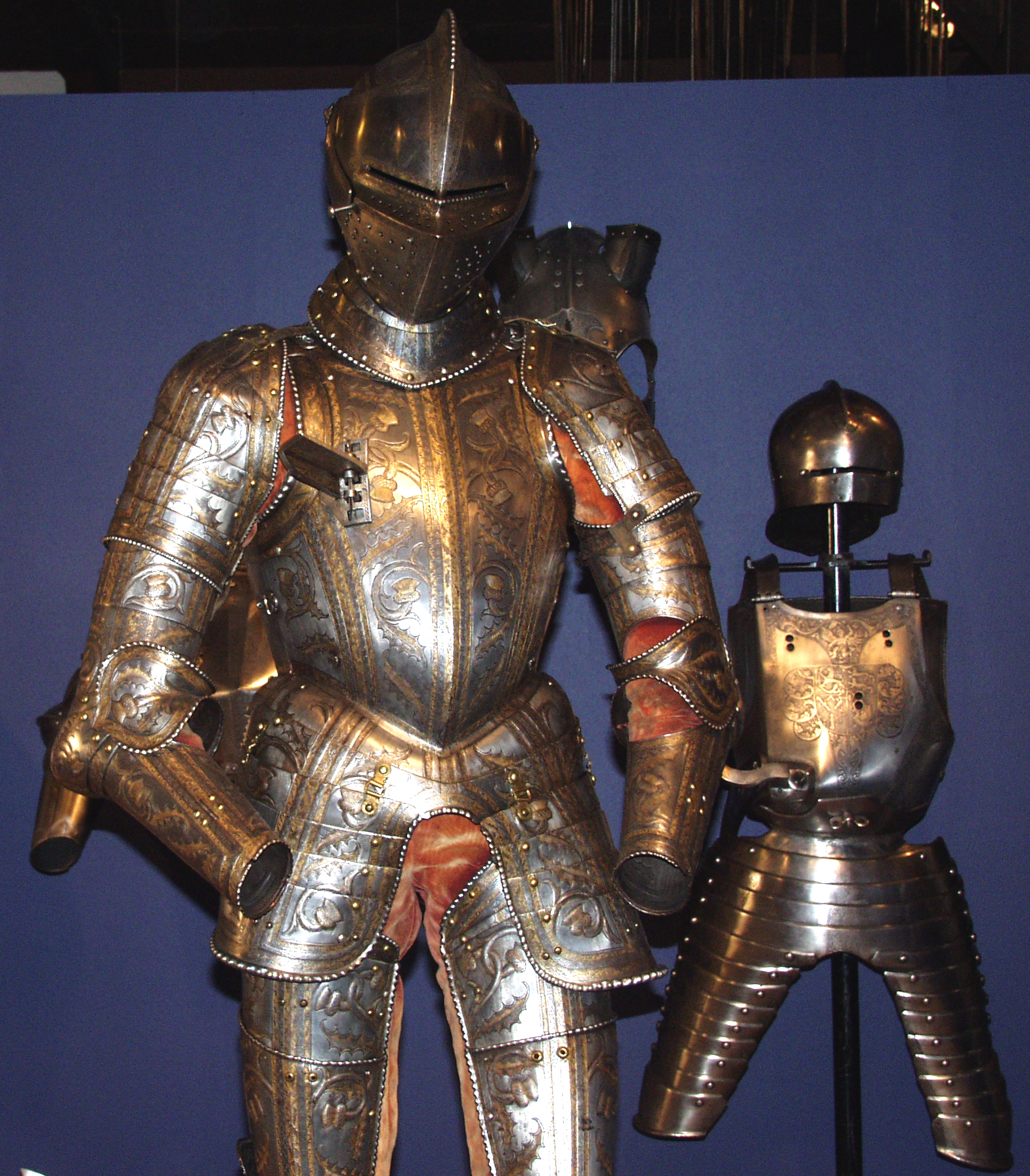 Billede af rustning i Tøjhusmuseets samling